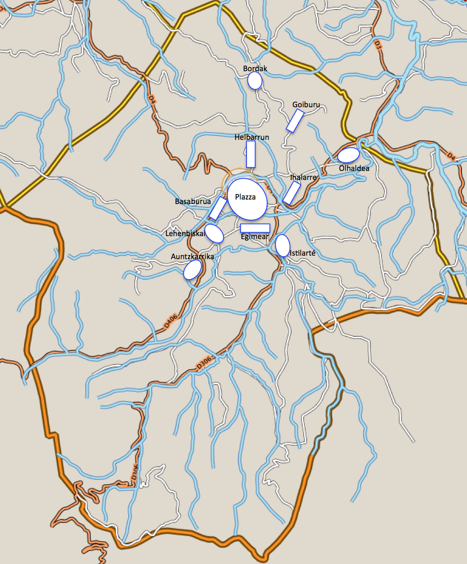 Sare - Morphologie urbaine